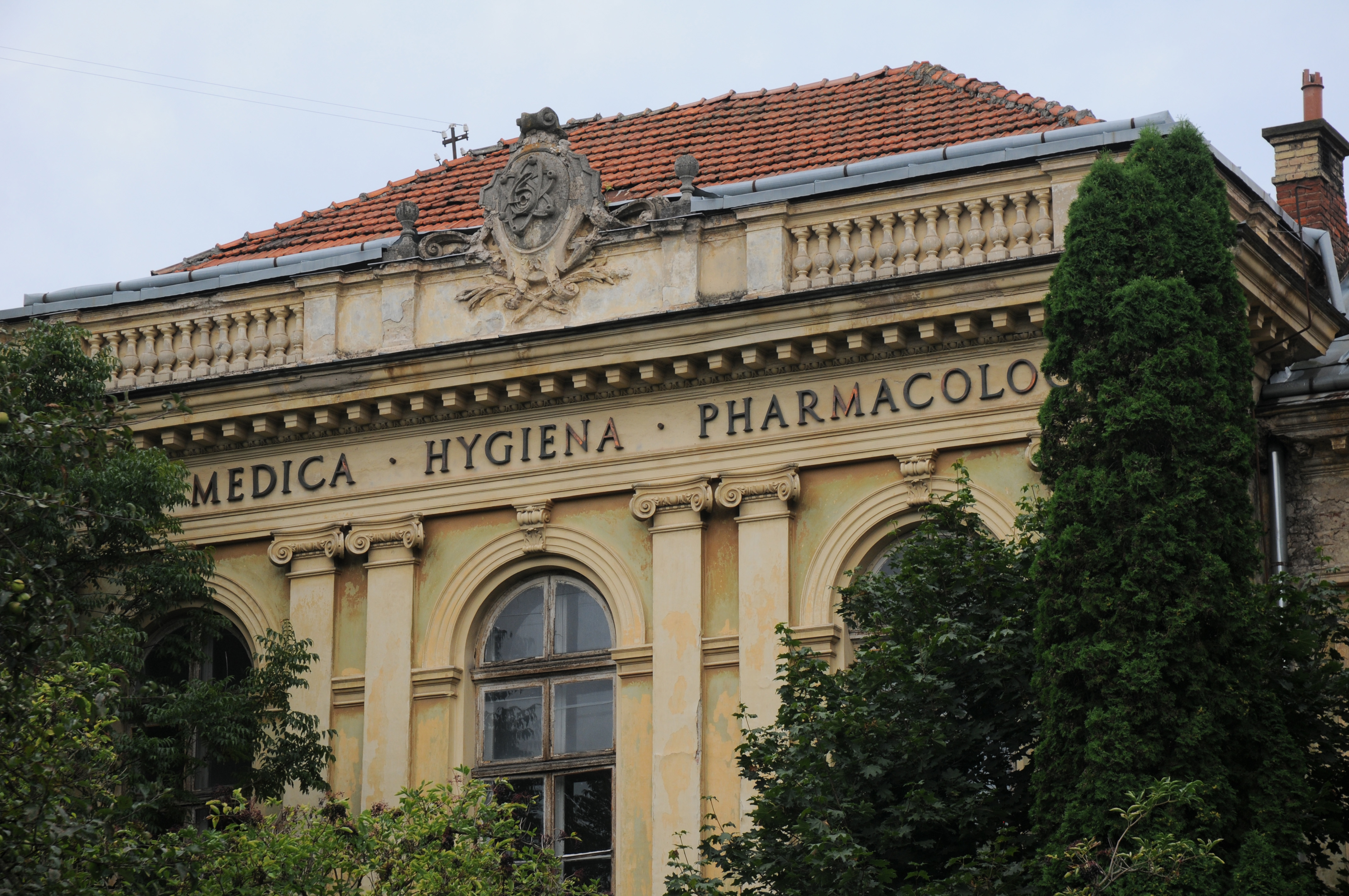 Львів, Пекарська, 52